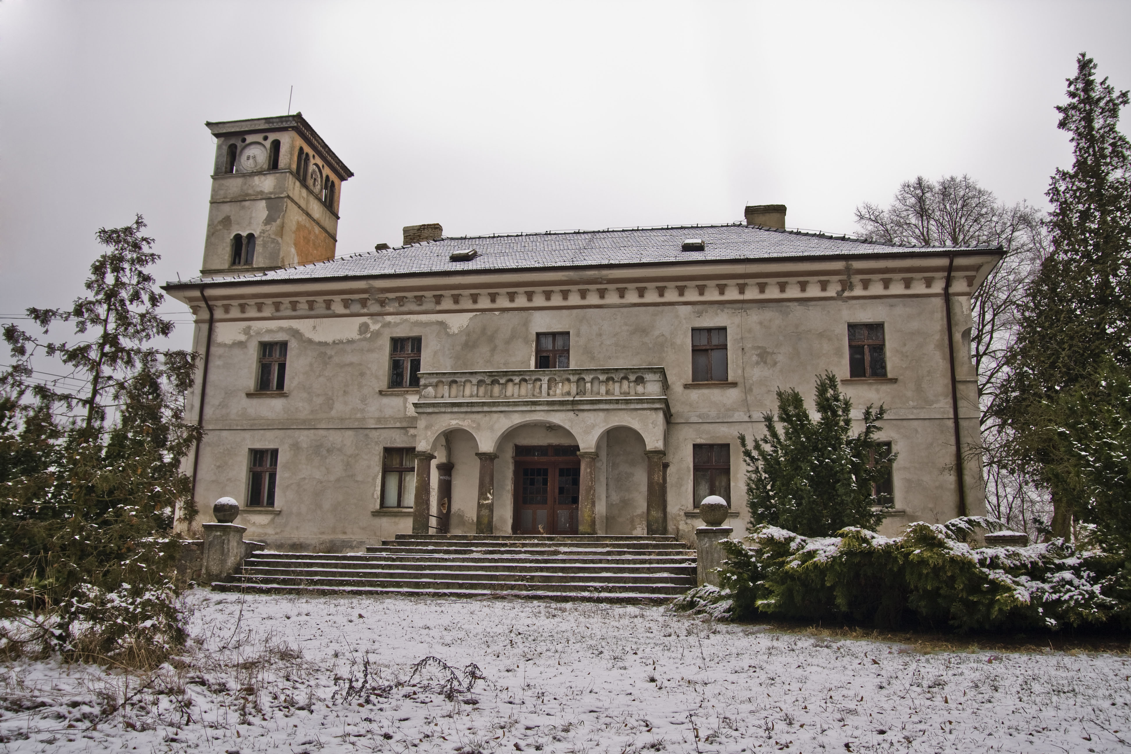 Pałacyk w Torzeńcu - widok od frontu.